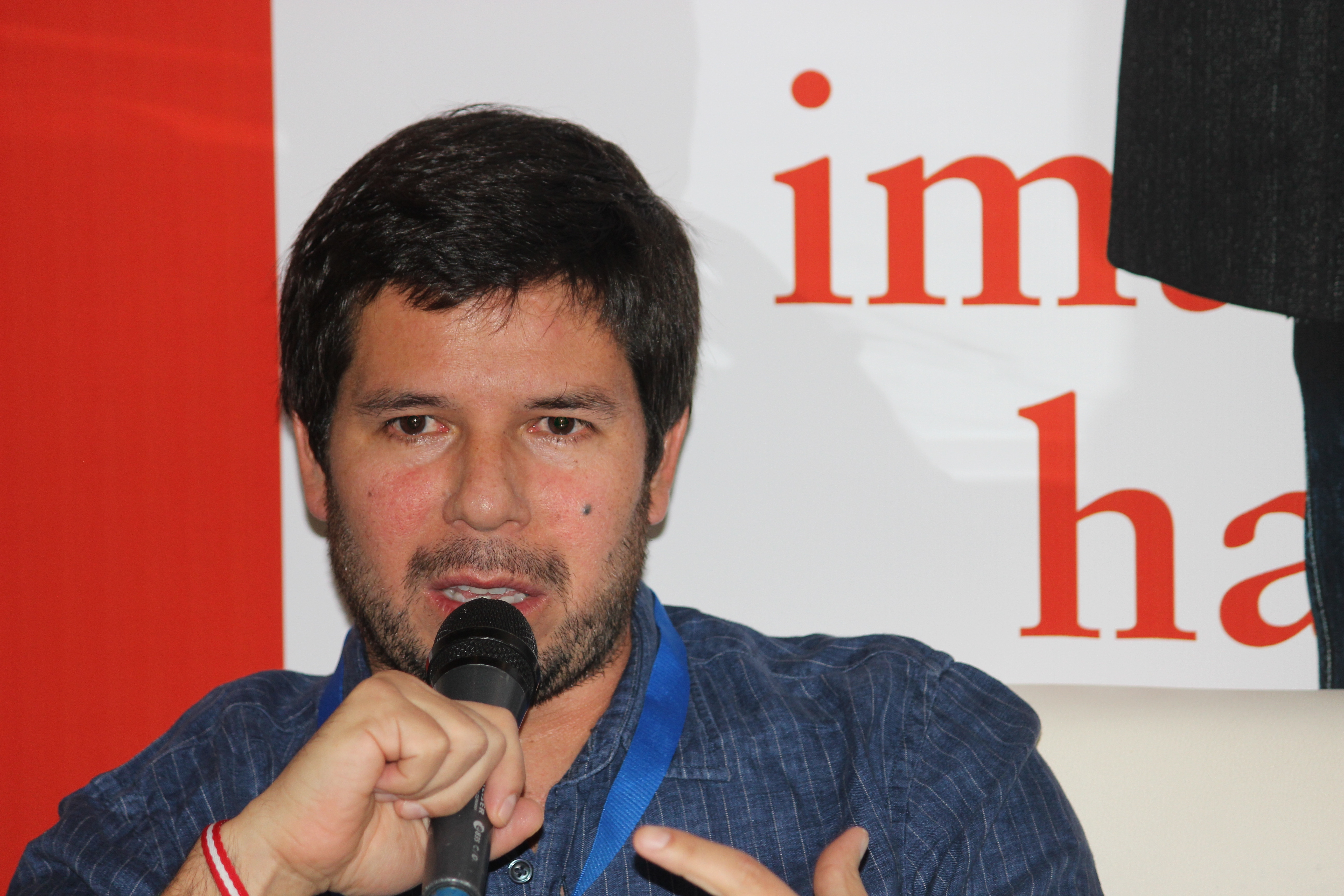 El escritor peruano Renato Cisneros durante la presentación de su Dejarás la tierra, realizada en la Feria Internacional del Libro de Santiago 2018 (sala Lily Garafulic, 3 de noviembre).